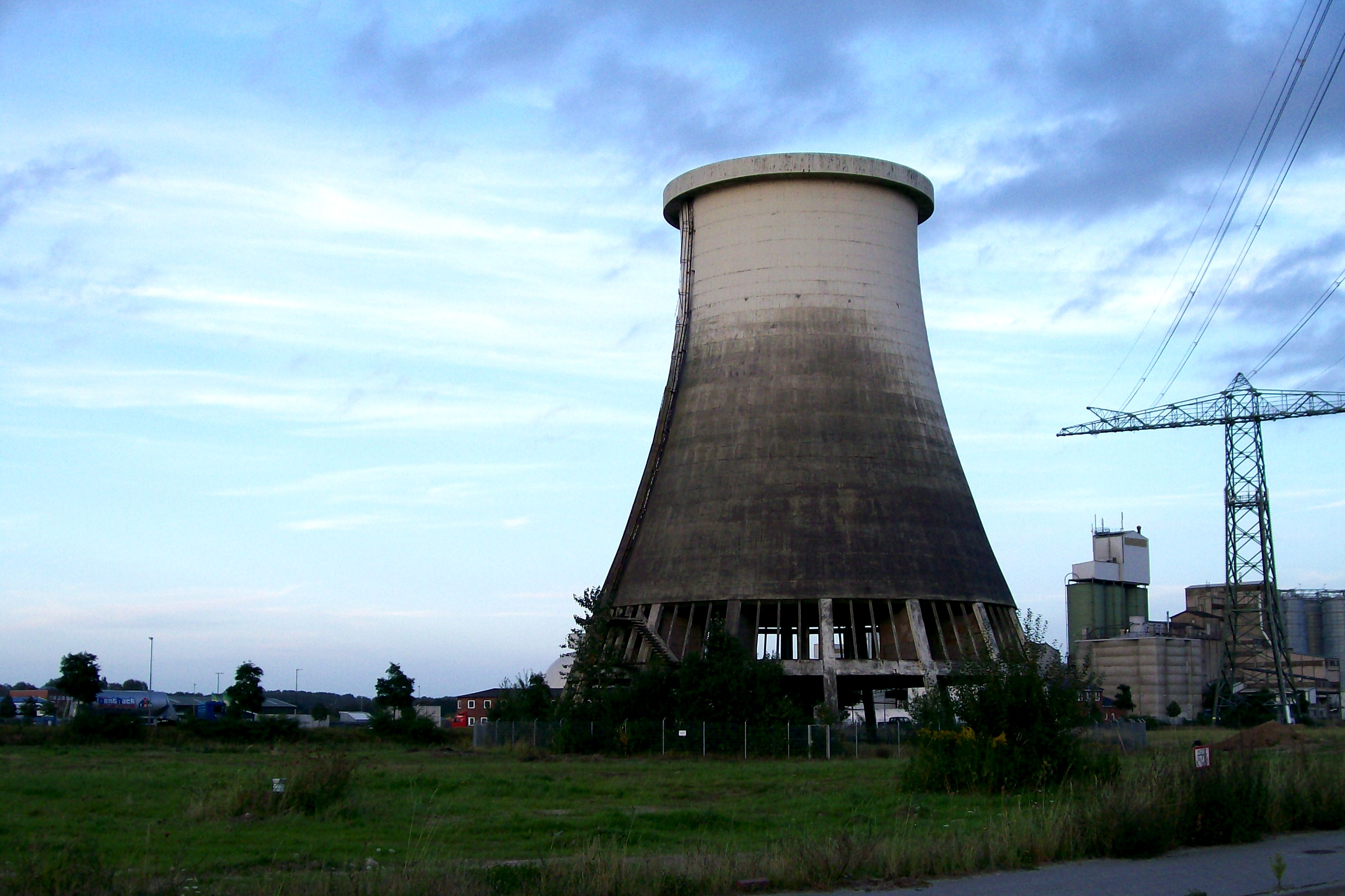 Ehemaliger Kühlturm des Hochofenwerks Lübeck in Lübeck-Herrenwyk